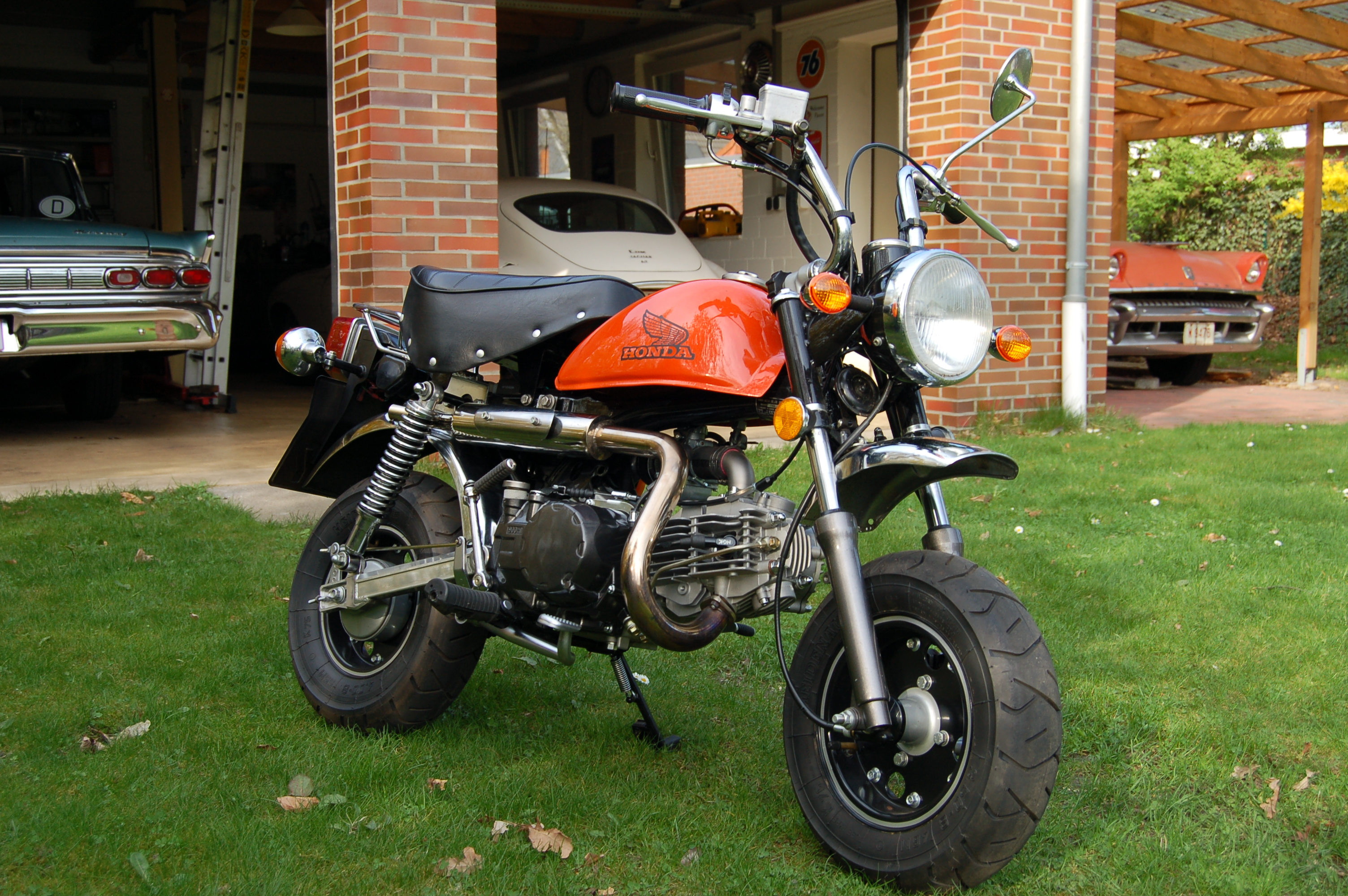 Honda Gorilla Z50J mit 160 ccm 4-Taktmotor und Monkey Tank, Baujahr 1985